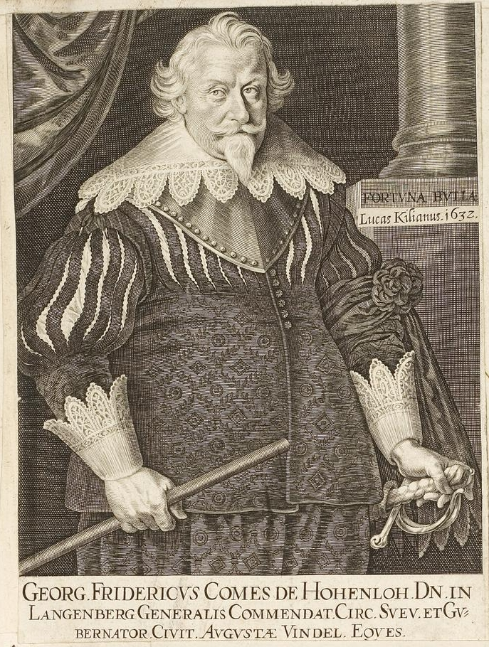 Grafik aus dem Klebeband Nr. 1 der Fürstlich Waldeckschen Hofbibliothek Arolsen Motiv: Georg Friedrich von Hohenlohe-Neuenstein-Weikersheim